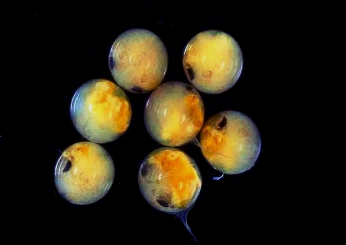 Potamon fluviatile (Herbst, 1785) eggs